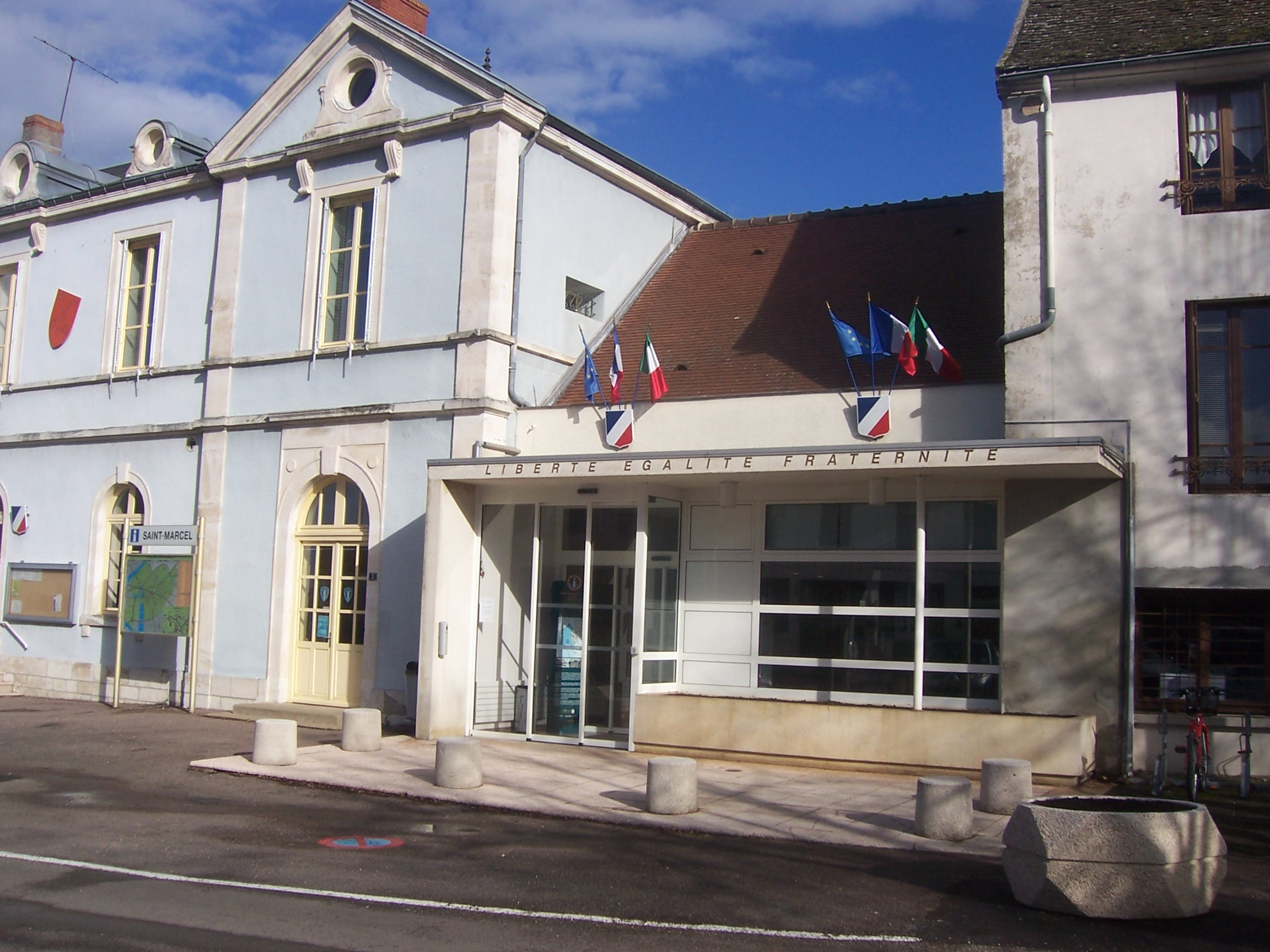 Saint-Marcel Mairie